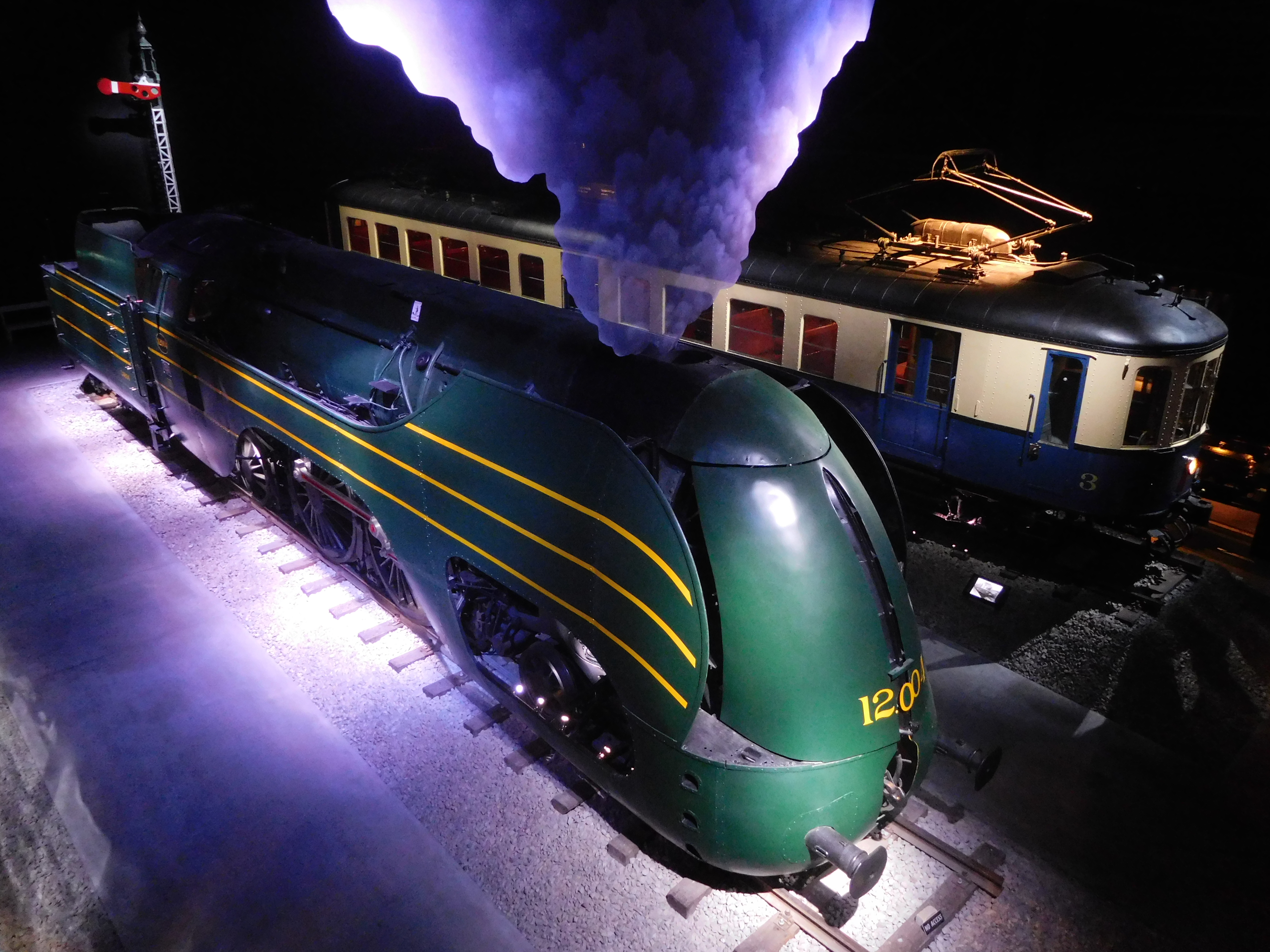 Locomotive Type 12 12.004 exposée à Train World